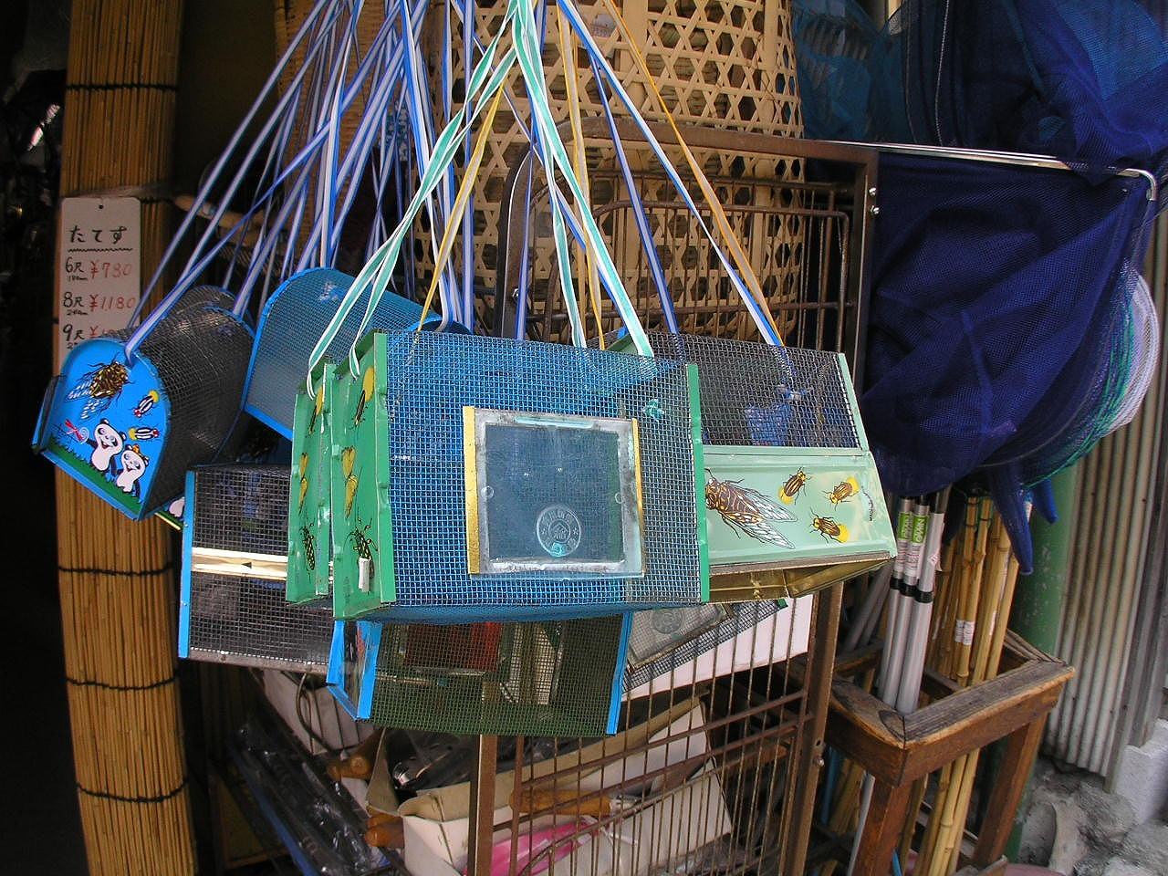 懐かしい金属製虫かご